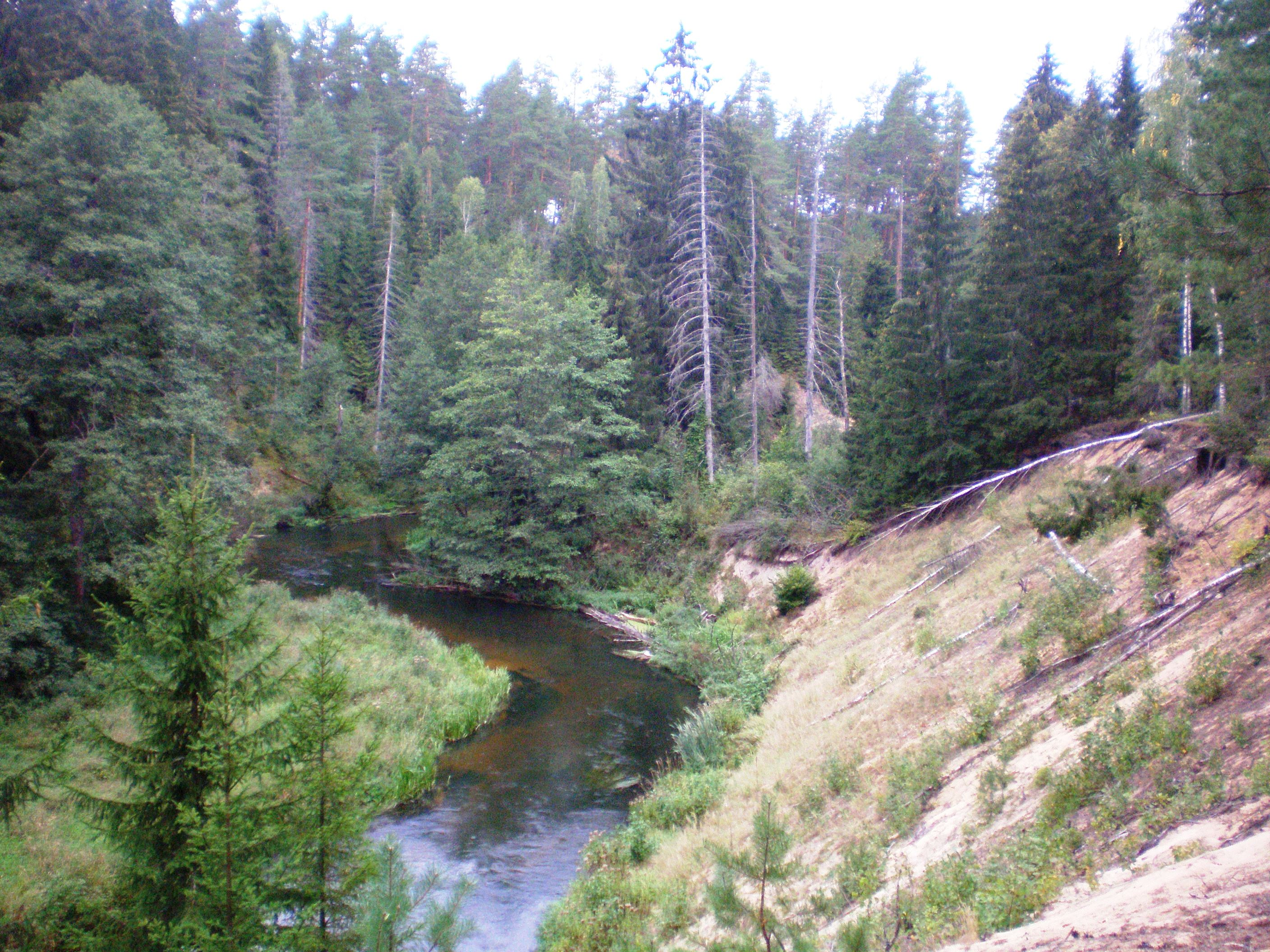 Mančiagirės skardžiai ir Ūlos upė, Varėnos raj.